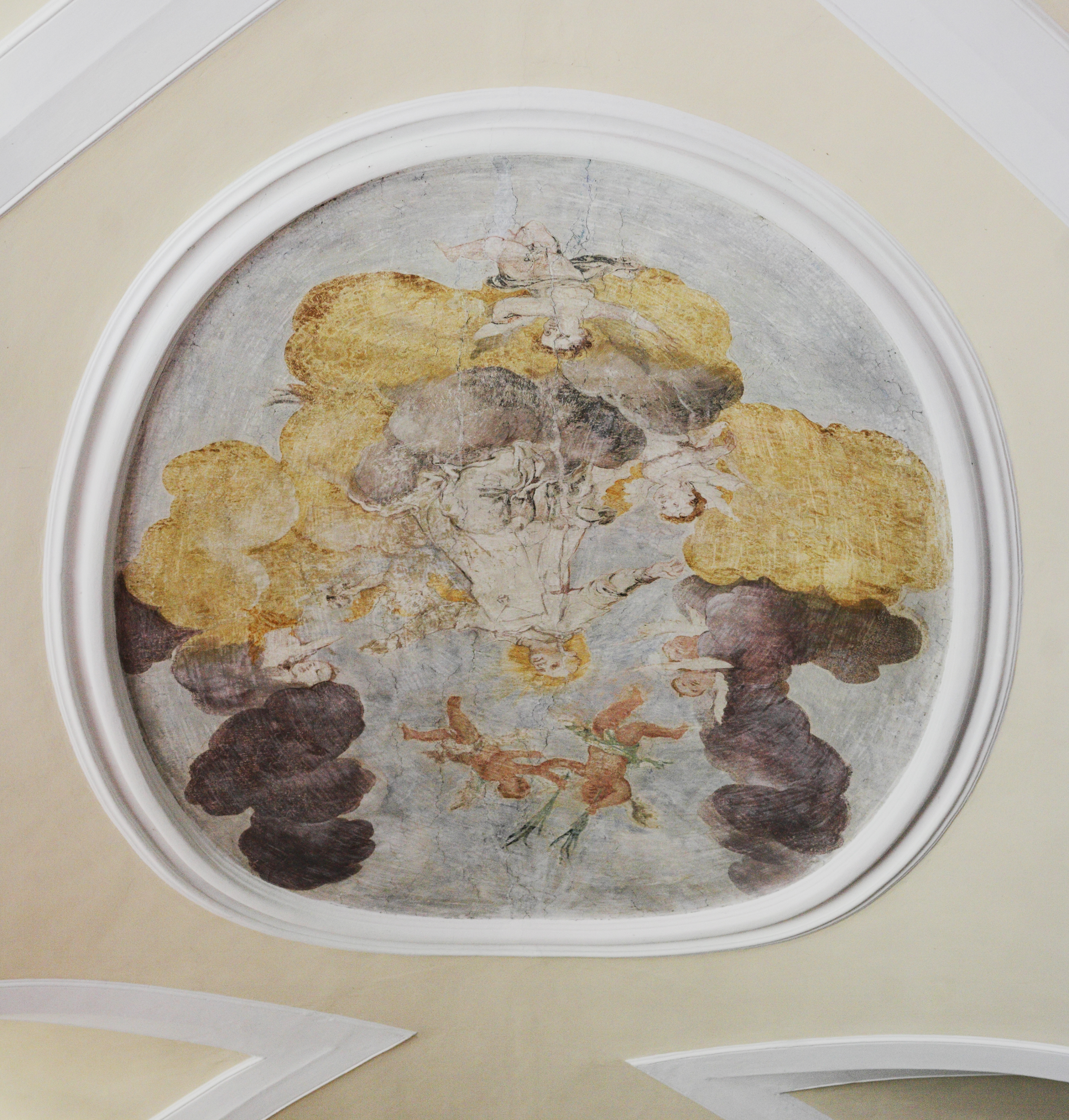 Eines von zwei Deckenfresken in der Leonsteiner Pfarrkirche (westlicher Teil des Kirchenschiffes)